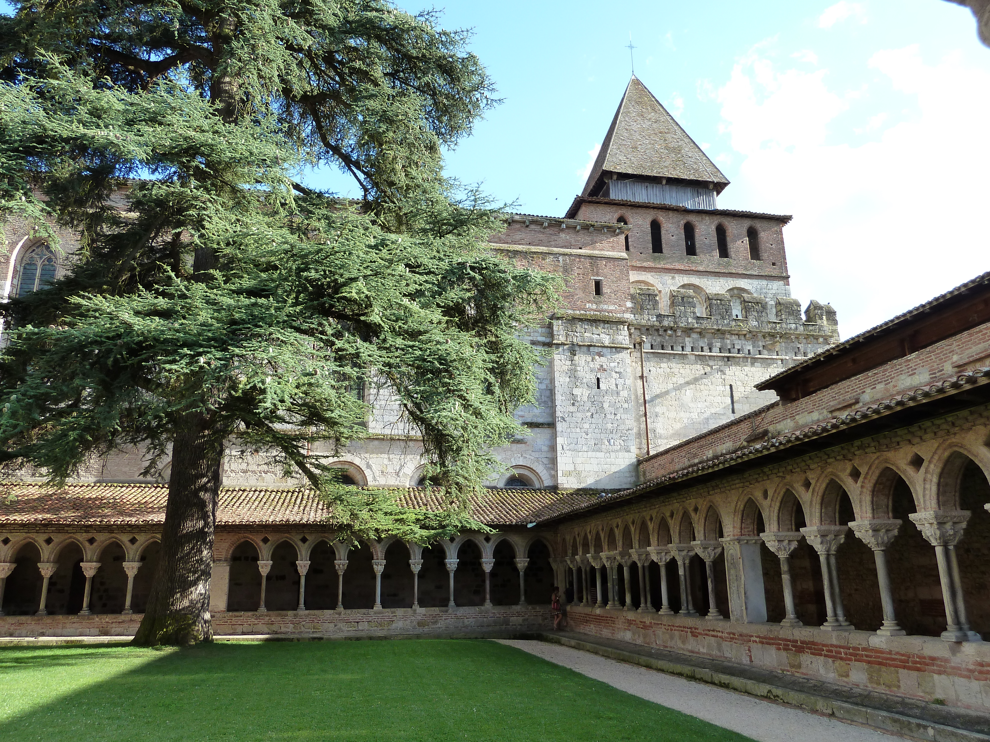 Cloître de Moissac